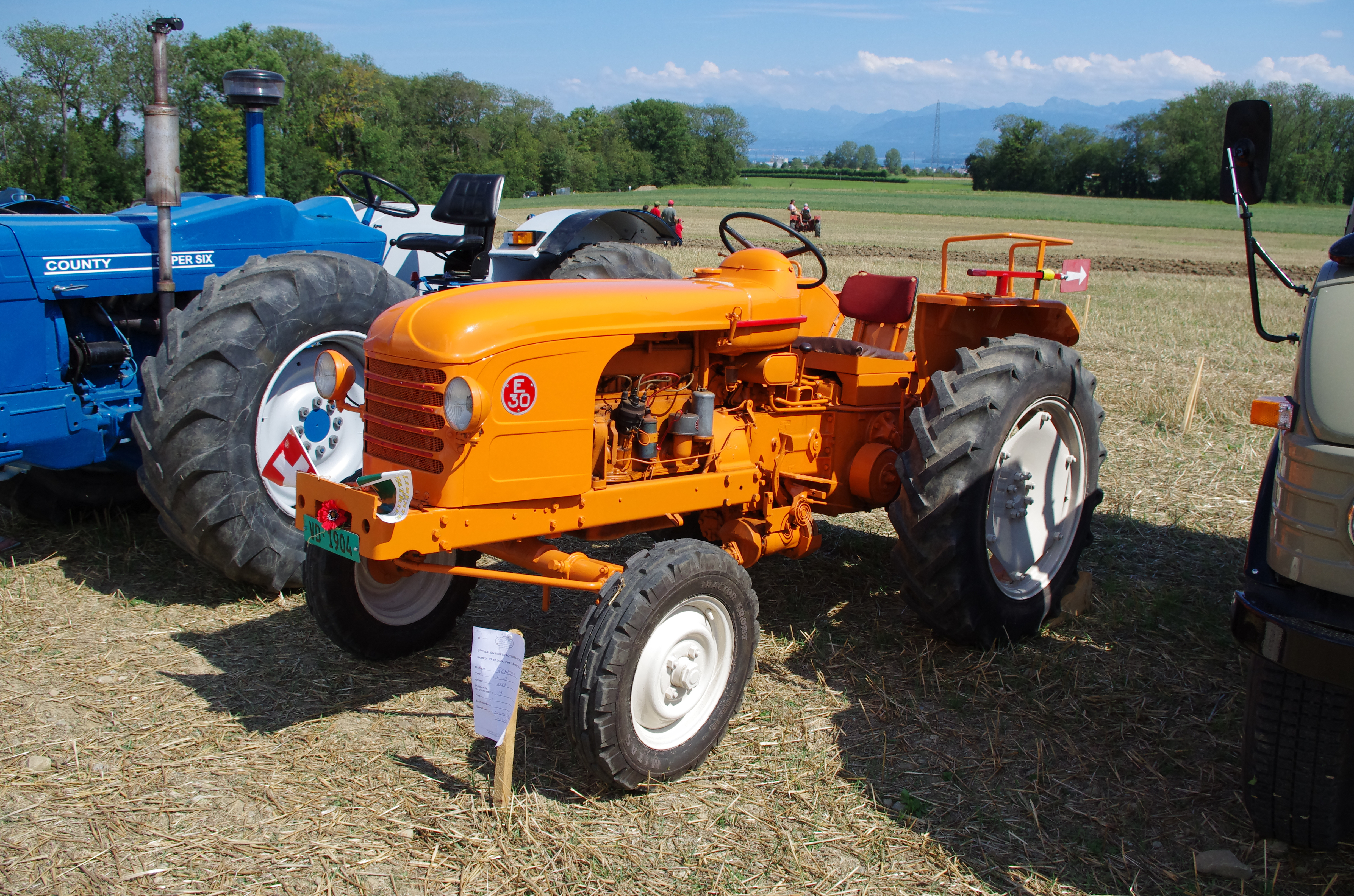 Tracteur Renault E30 - 1957 - gauche